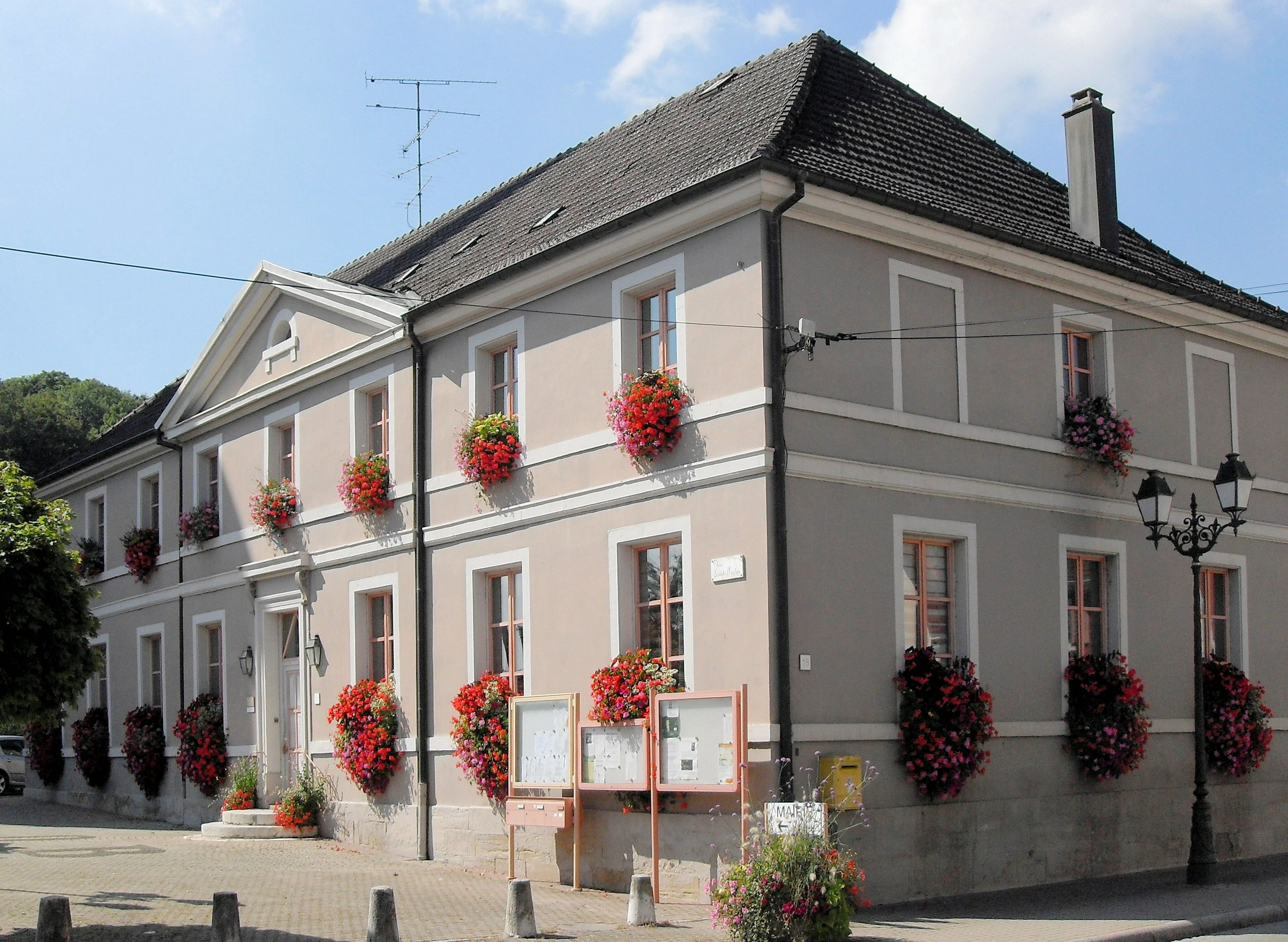 La mairie d'Oltingue